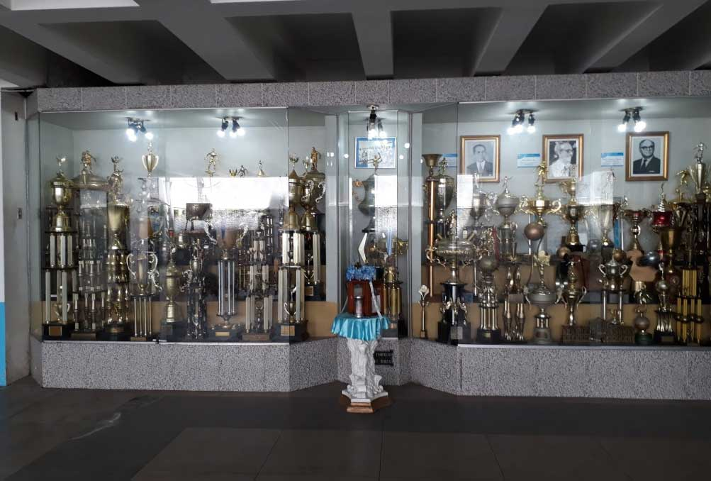 Sede Social, sala de trofeus!